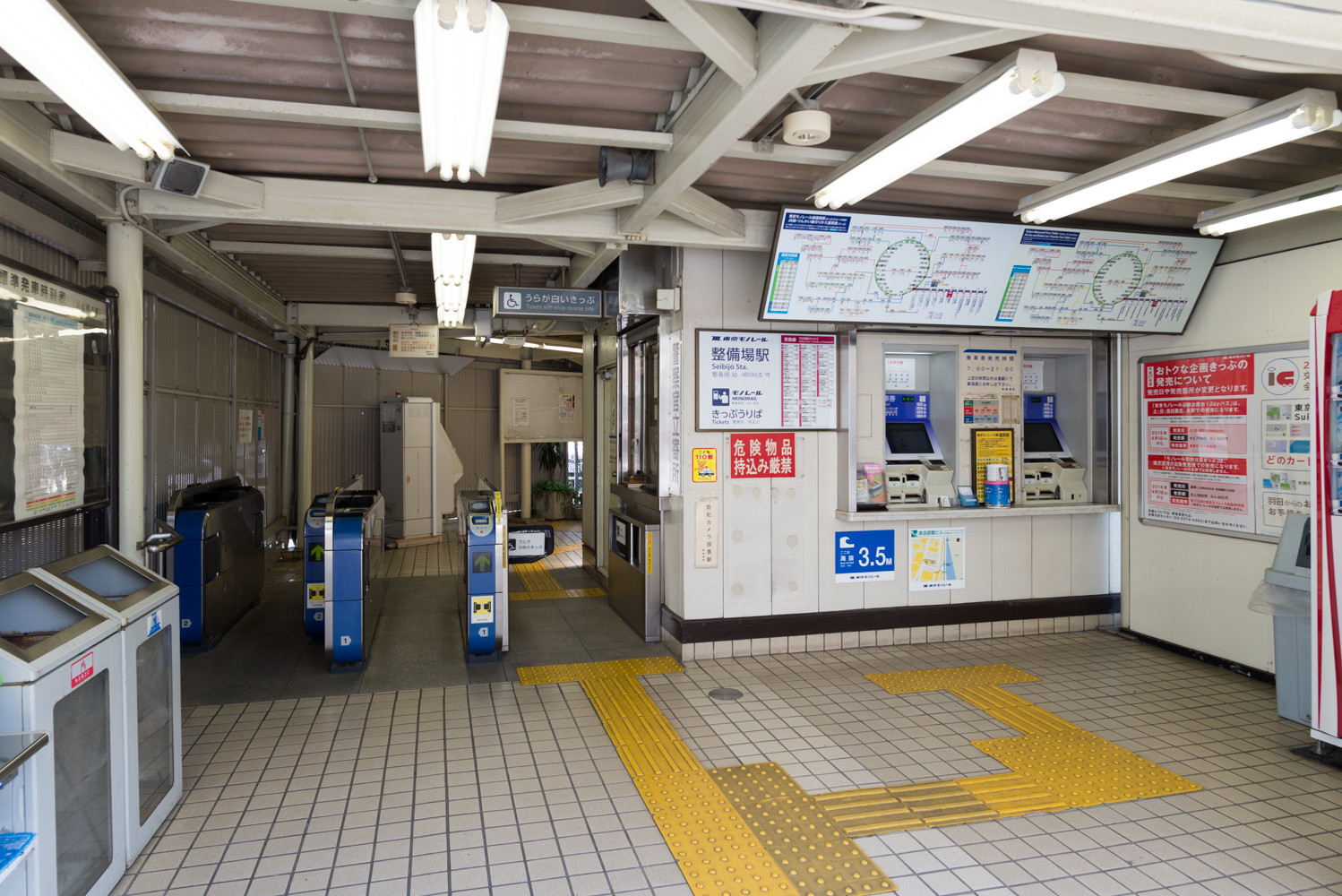 東京モノレール株式会社羽田空港線整備場駅